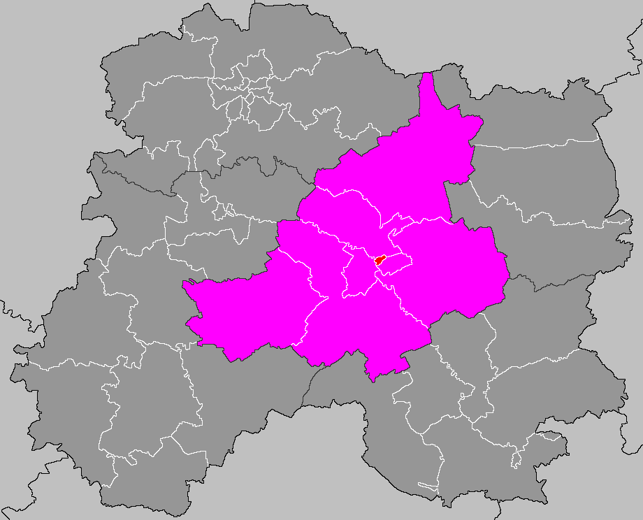 Localisation du canton de Châlons-en-Champagne-1